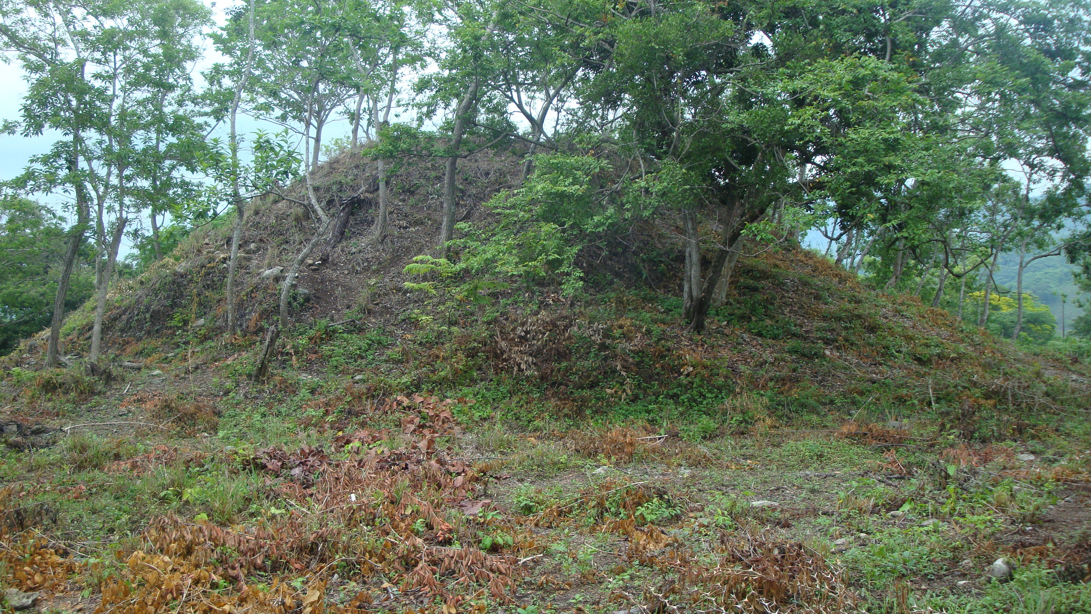 muntículo pirámidal en Los Horcones, Tonalá, Chiapas